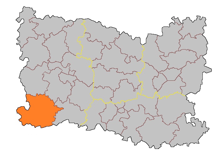 Кантон Шомон-ан-Вексен на карте департамента Уаза